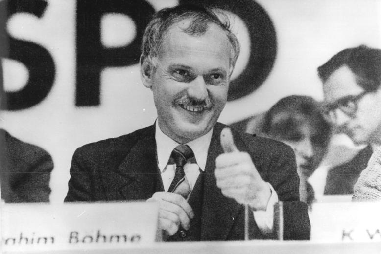 ADN-ZB-Kluge-22.2.2990-Le-Leipzig: SPD-Parteitag- Der erste ordentliche Parteitag der DDR-SPD wurde in der Leipziger Agrarhalle eröffnet. Geschäftsführer Ibrahim Böhme zeigt sich optimistisch.